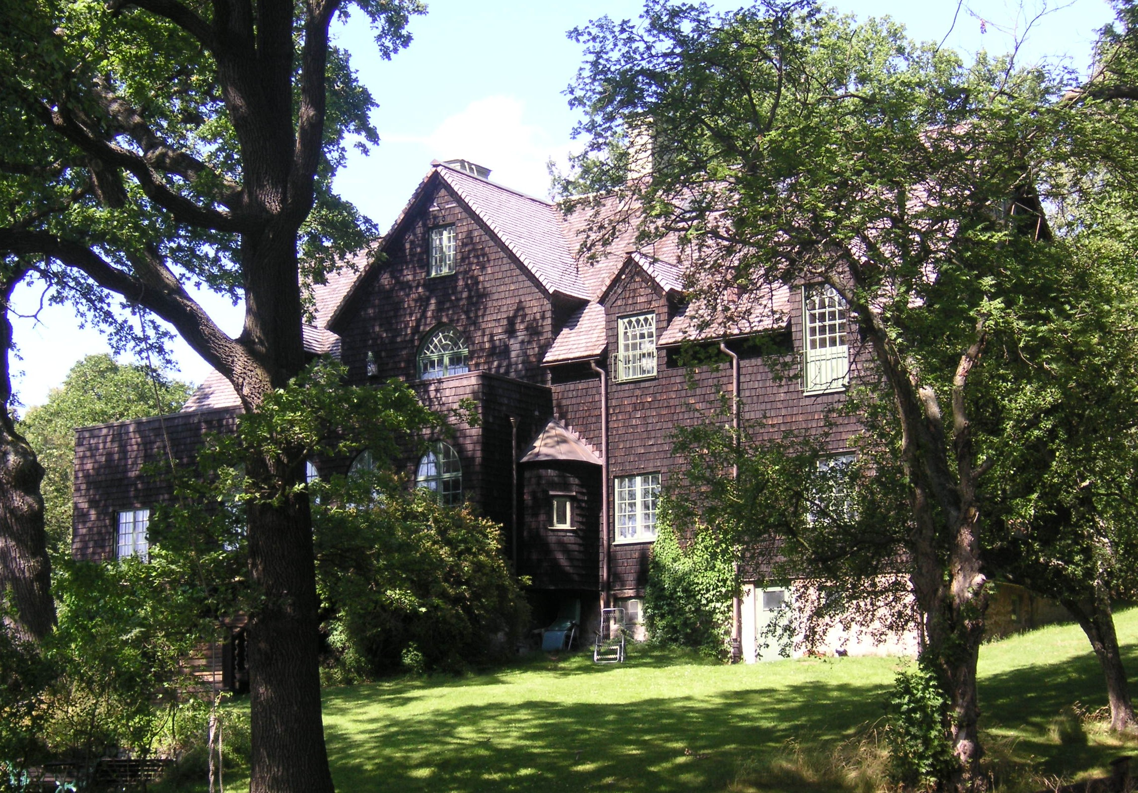 Villa Mullberget på Djurgården i Stockholm